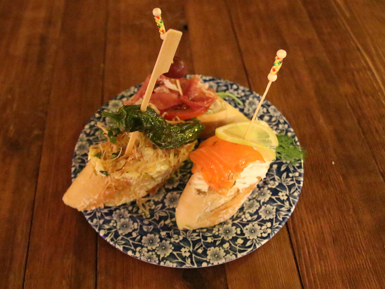 Drei verschiedene Pintxos in einer Tapas-Bar in Palma de Mallorca.